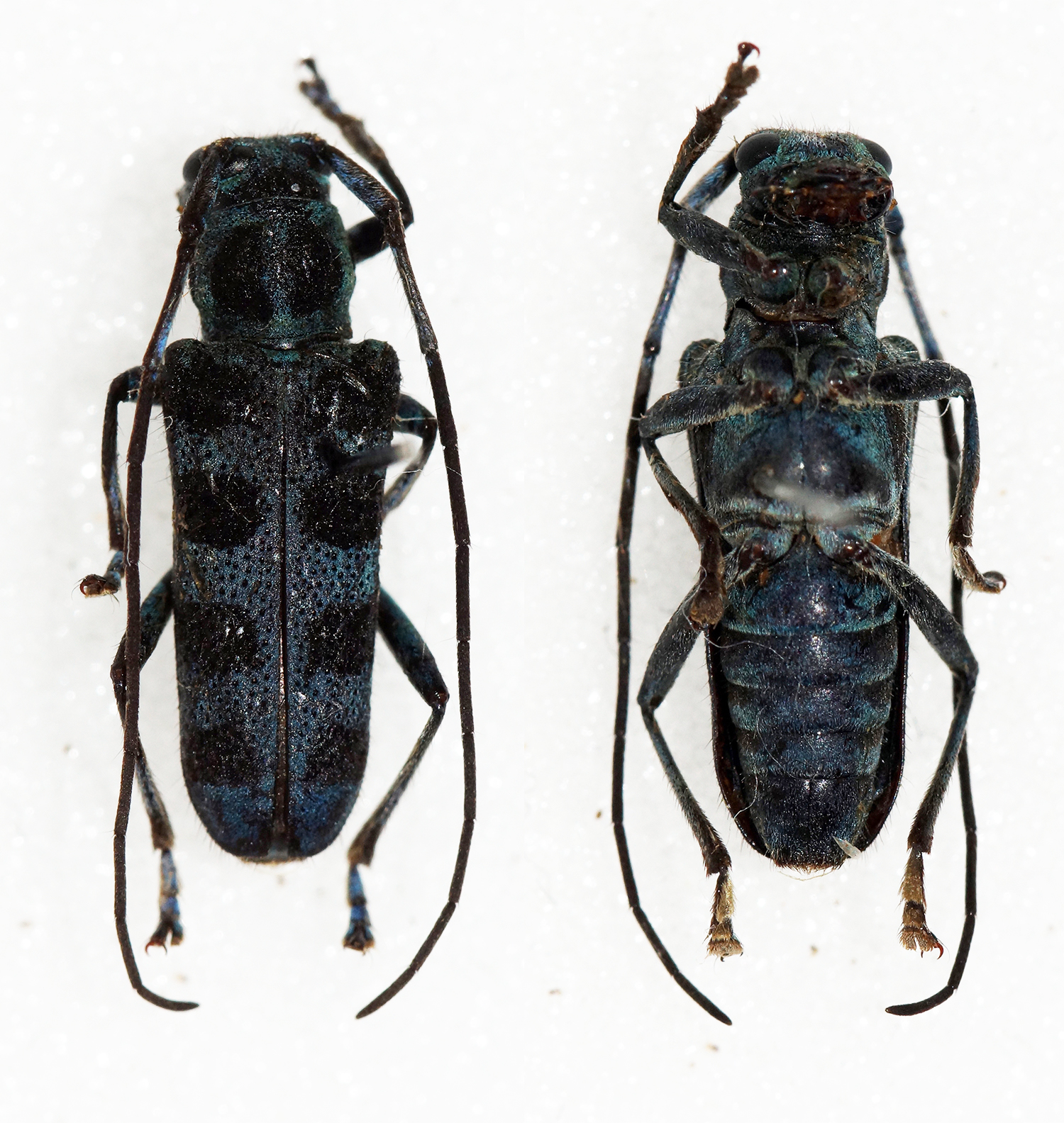 Breuning,1965 Sex: Male Data: 07-1996 - 80km NW Hanoi - 1200m - Tam Dao - Vietnam Size: 13mm